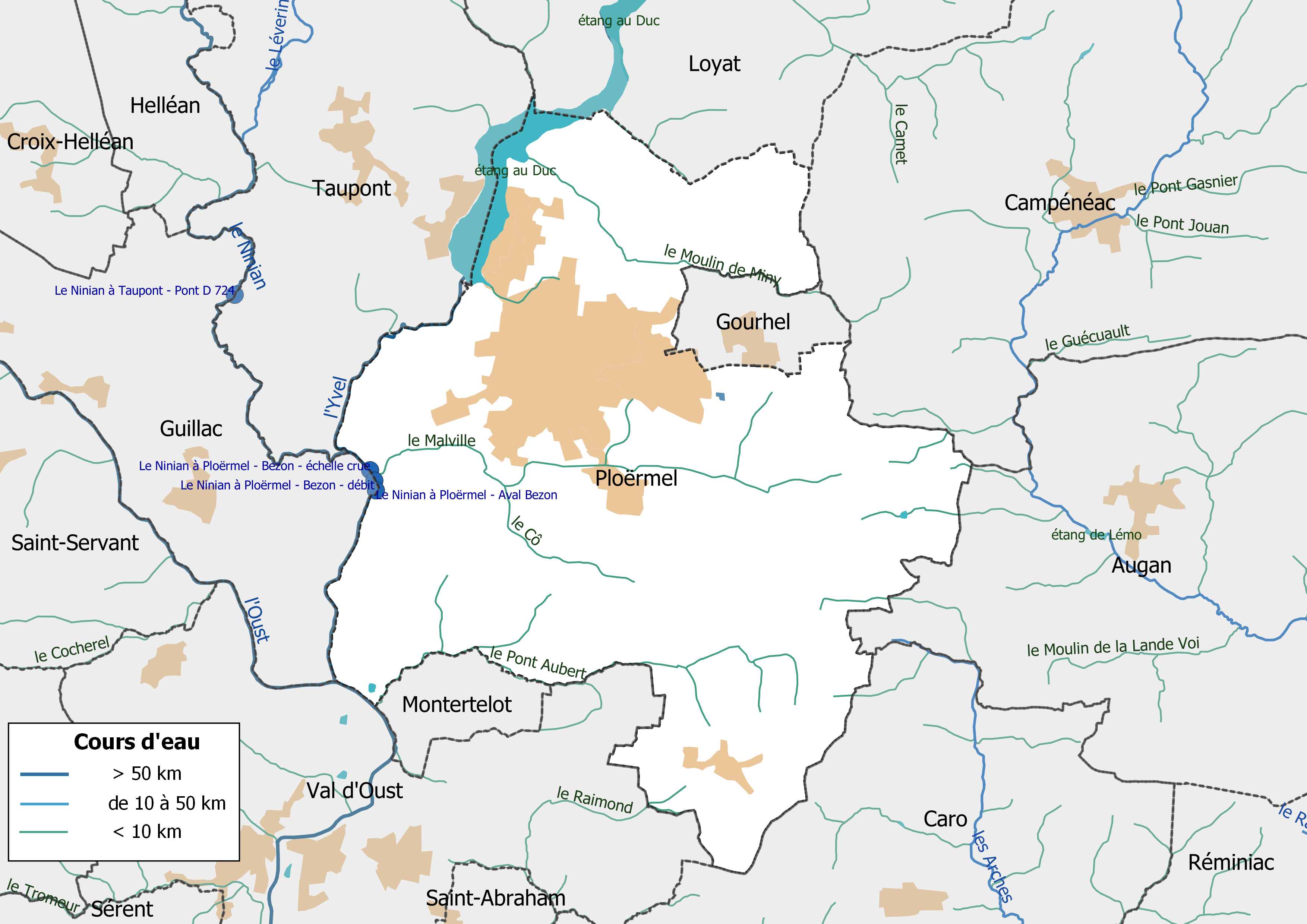 Carte du réseau hydrographique de la commune de Ploërmel.